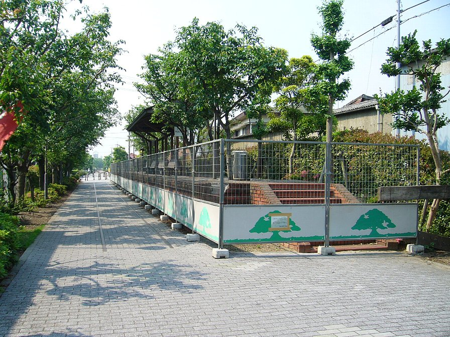 岡山臨港鉄道 新保駅跡（臨港グリーンアベニュー） かつてのホームを模した休憩所がある